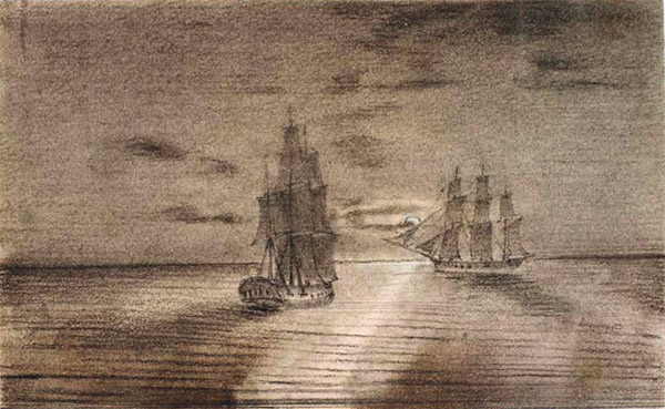 Charles-Alexandre Lesueur (1778–1846): Die Korvetten "Le Géographe" und "Le Naturaliste" während der wissenschaftlichen Expedition nach Australien (1800–1804) unter Leitung von Nicolas Baudin (1754–1803). Schwarze und weiße Kreide sowie Bleistift auf Papier. © Muséum d’histoire naturelle du Havre.